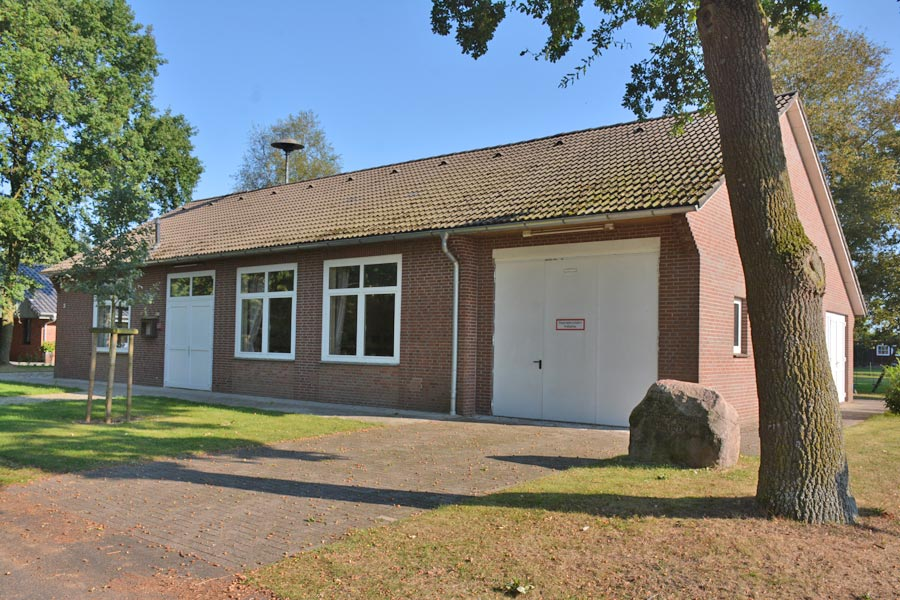 Wistedt Feuerwehr-Gebäude